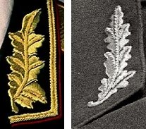 шитье маршалов Сов Союза